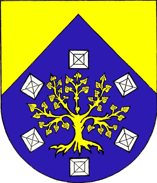 Znak obce Stará Paka